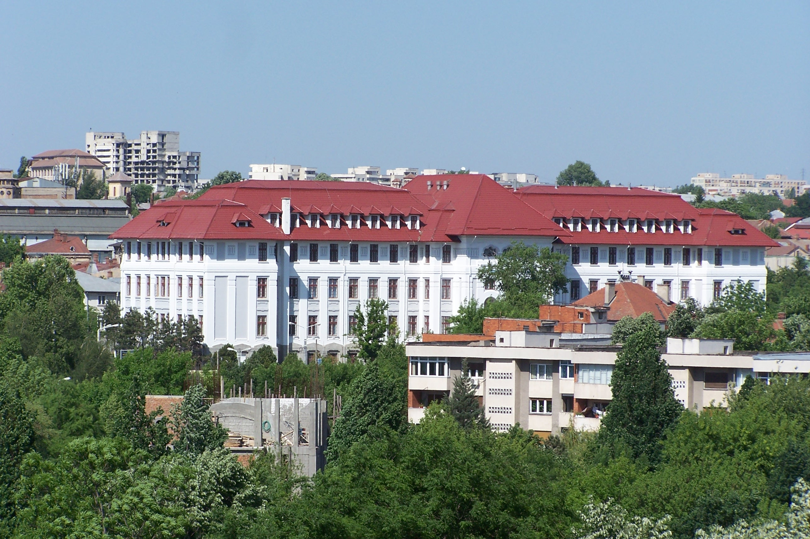 Craiova - Universitatea de Medicină şi Farmacie - clădirea veche